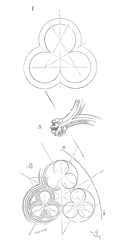 ... Trèfle : Nom que l'on donne à un membre d'architecture de forme géométrique, obtenu au moyen de trois cercles dont les centres sont placés aux sommets des angles d'un triangle équilatéral. On dit aussi trilobe (fig. 1). À dater de la fin du XIIe siècle jusqu'au XVIe, on s'est beaucoup servi de cette figure dans la composition des meneaux, des roses, des arcatures, et en général des claires-voies. Quelquefois les points de rencontre des cercles sont terminés par un ornement feuillu A, par une tête humaine ou d'animal ...